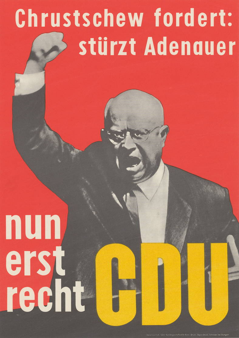 1961: Bundestagswahlplakat, vgl. Plakat Nr. 10-001-900Plakatart:Kandidaten-/Personenplakat mit PorträtObjekt-Signatur:10-031 : 50206Bestand:CDU-Plakate (10-031)GliederungBestand10-18:CDU-Plakate (10-031) » Jubiläen » PostersetLizenz:KAS/ACDP 10-031 : 50206 CC-BY-SA 3.0 DE